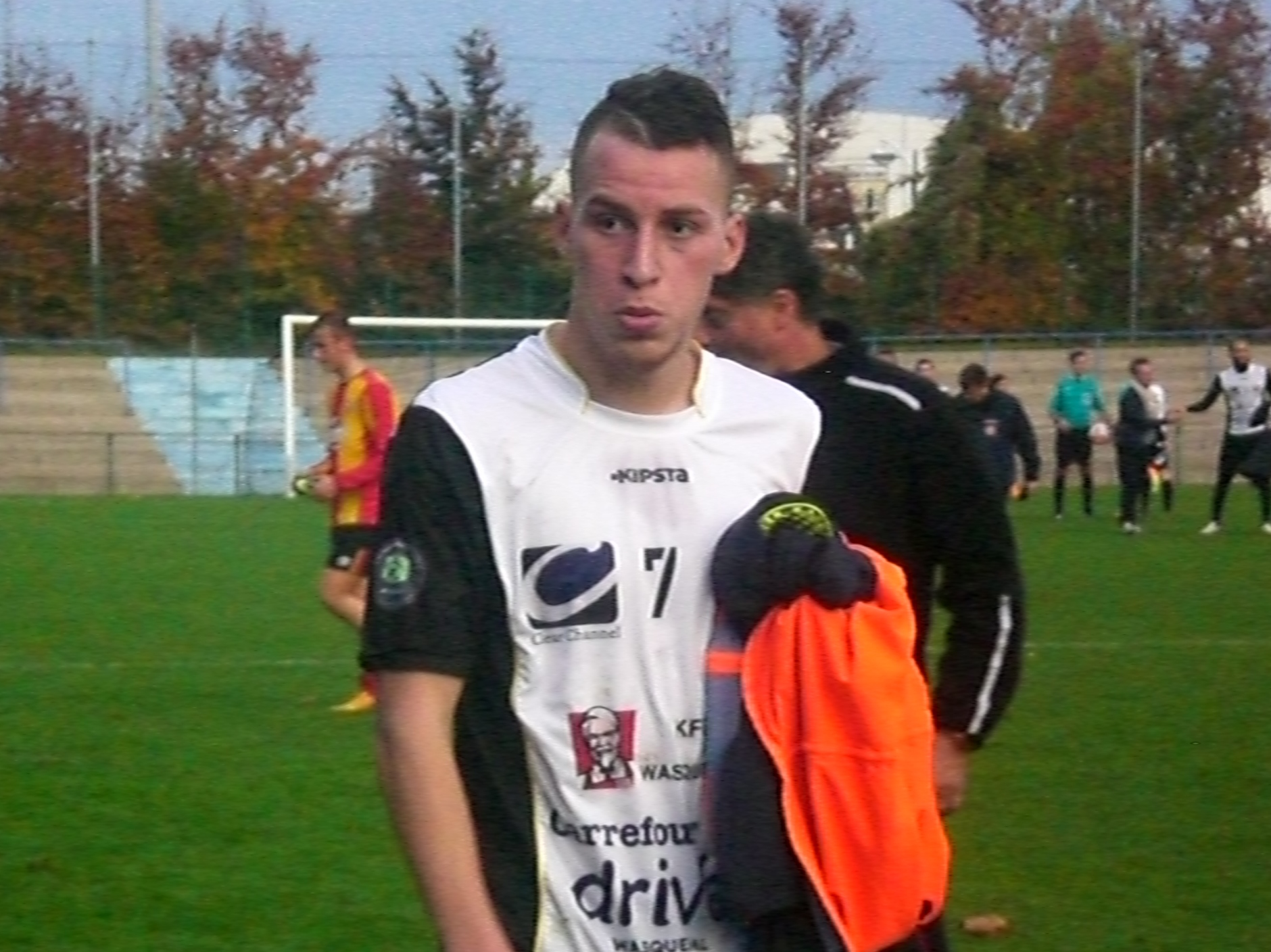 Messaoud Bouardja après le match RC Lens B / ES Wasquehal, comptant pour la dixième journée du Championnat de France de football amateur (CFA), le 8 novembre 2015, au Stade François Blin d'Avion.